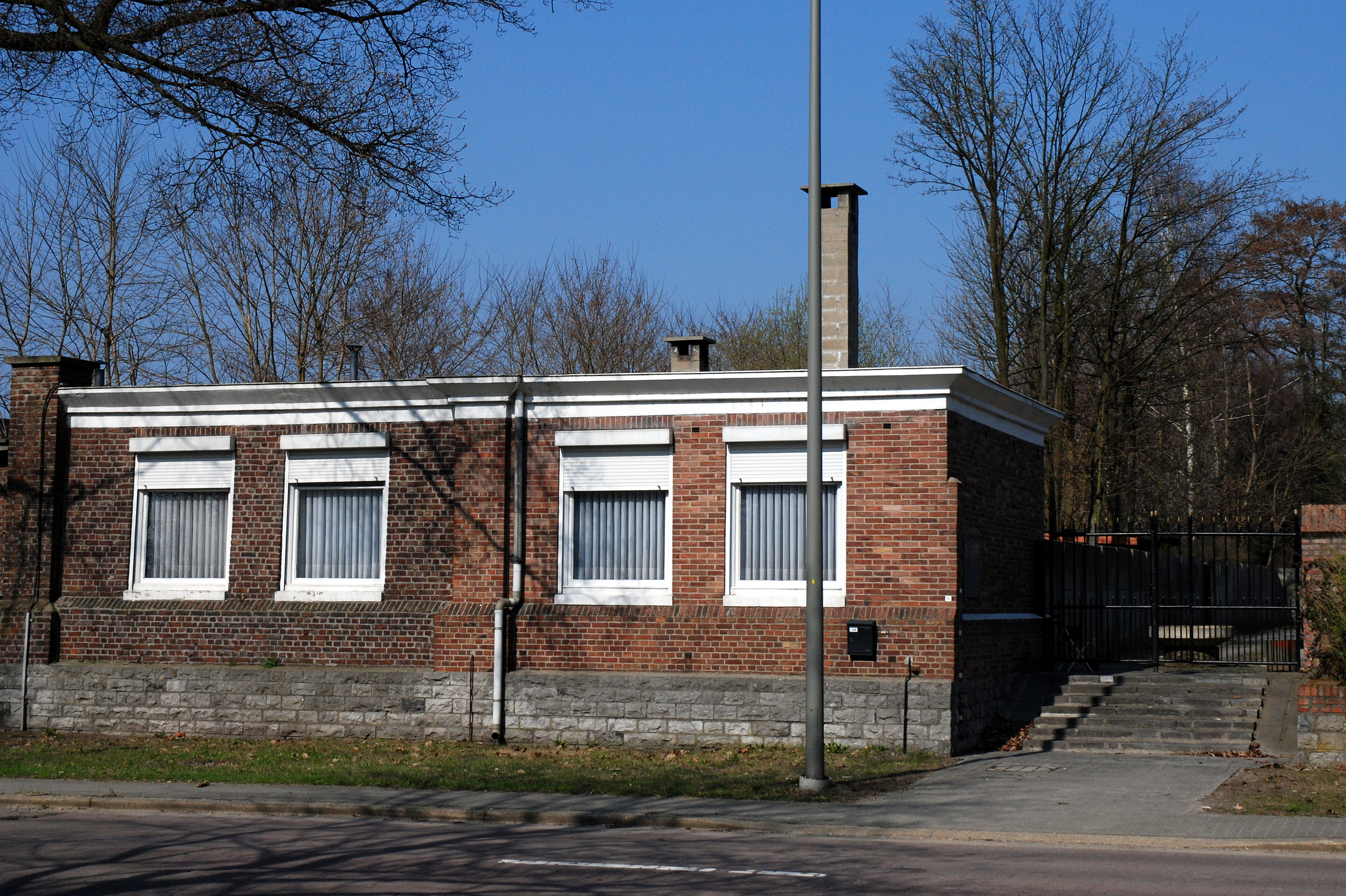 Gebouw voor de technische dienst en de trap naar de hoofdingang, het enige gebouw dat nog bewaard bleef van de steenkoolmijn van Zwartberg, België